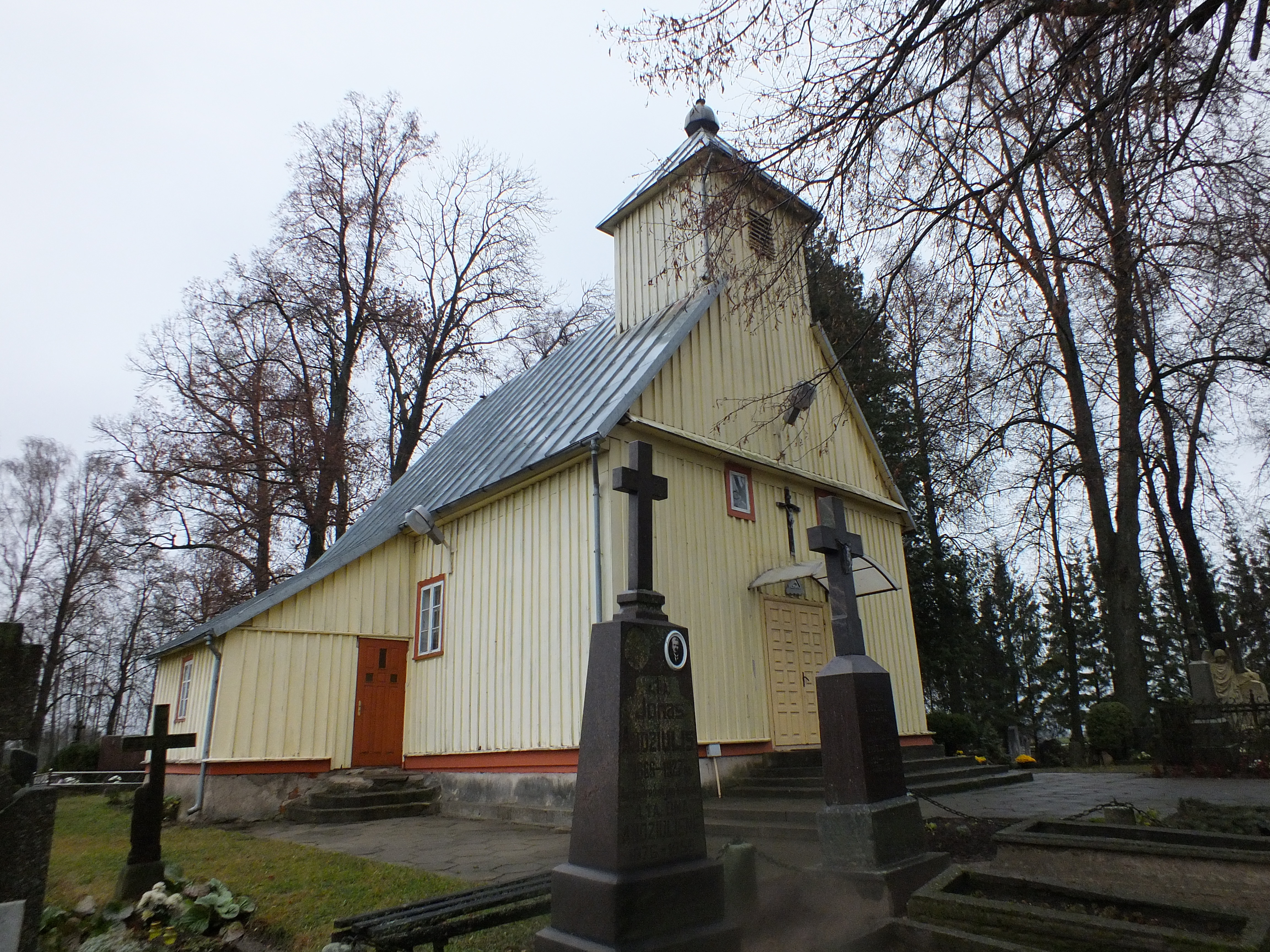 Paežerių šv.Antano koplyčia (1828)